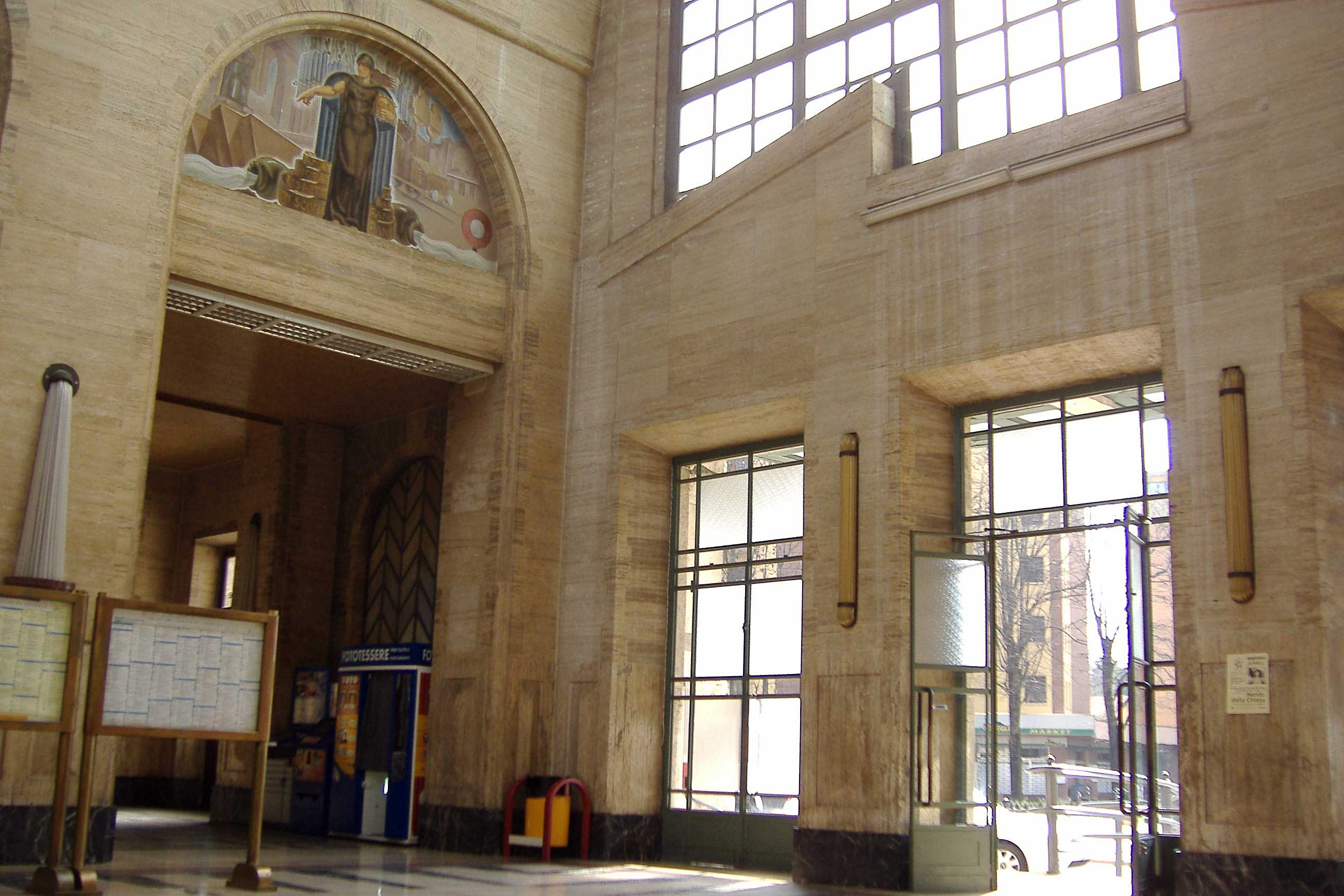 Salsomaggiore Terme (Italy)- Railway station, inside / interno della stazione ferroviaria